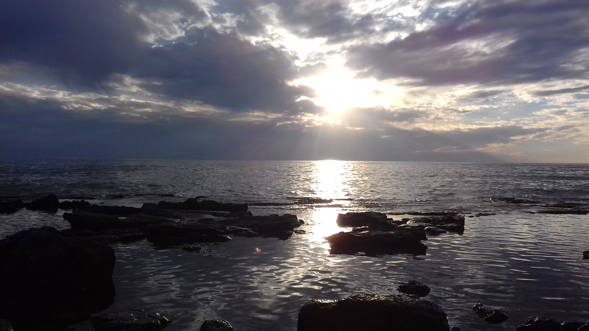 طبيعة